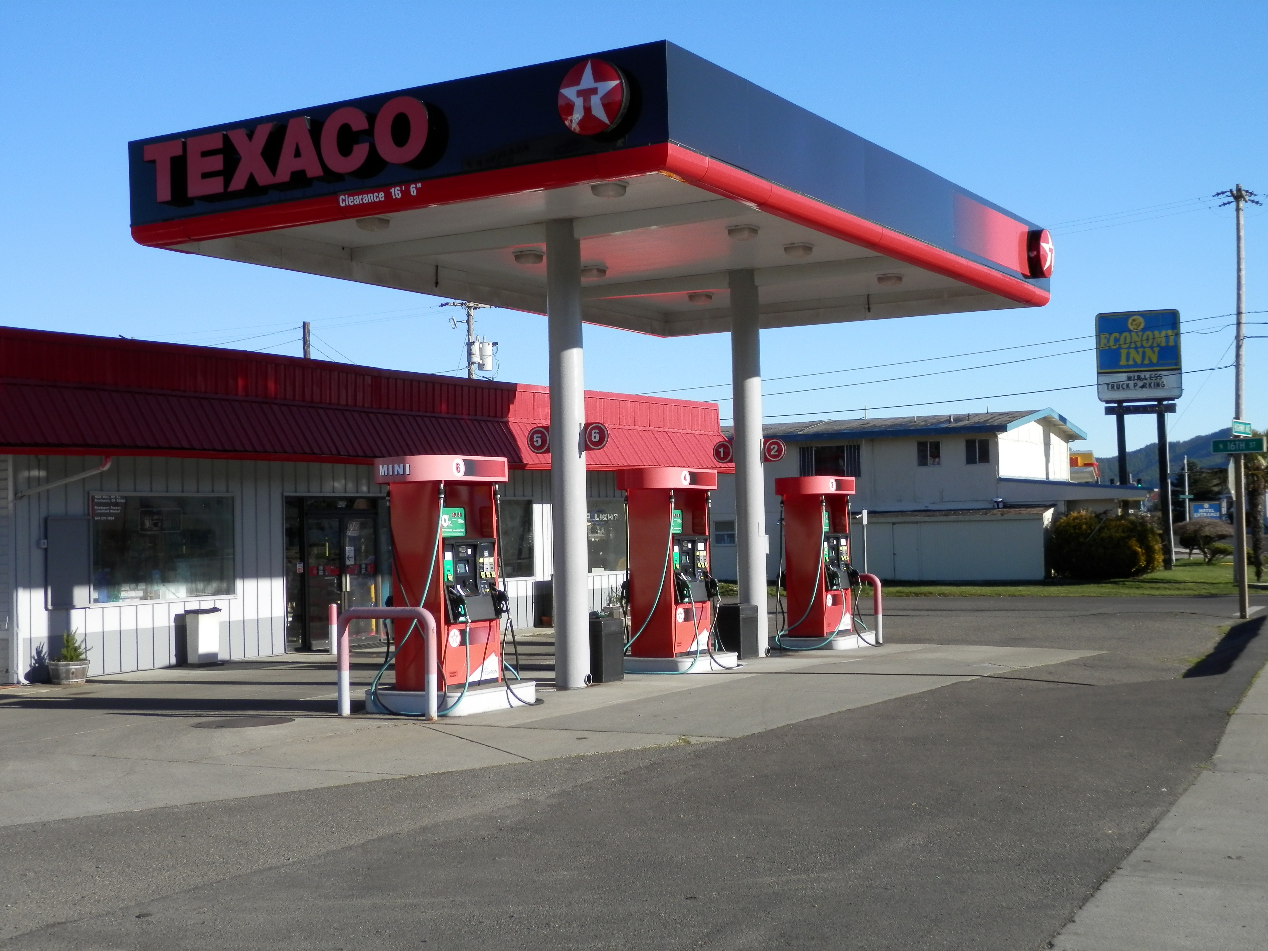 TEXACO